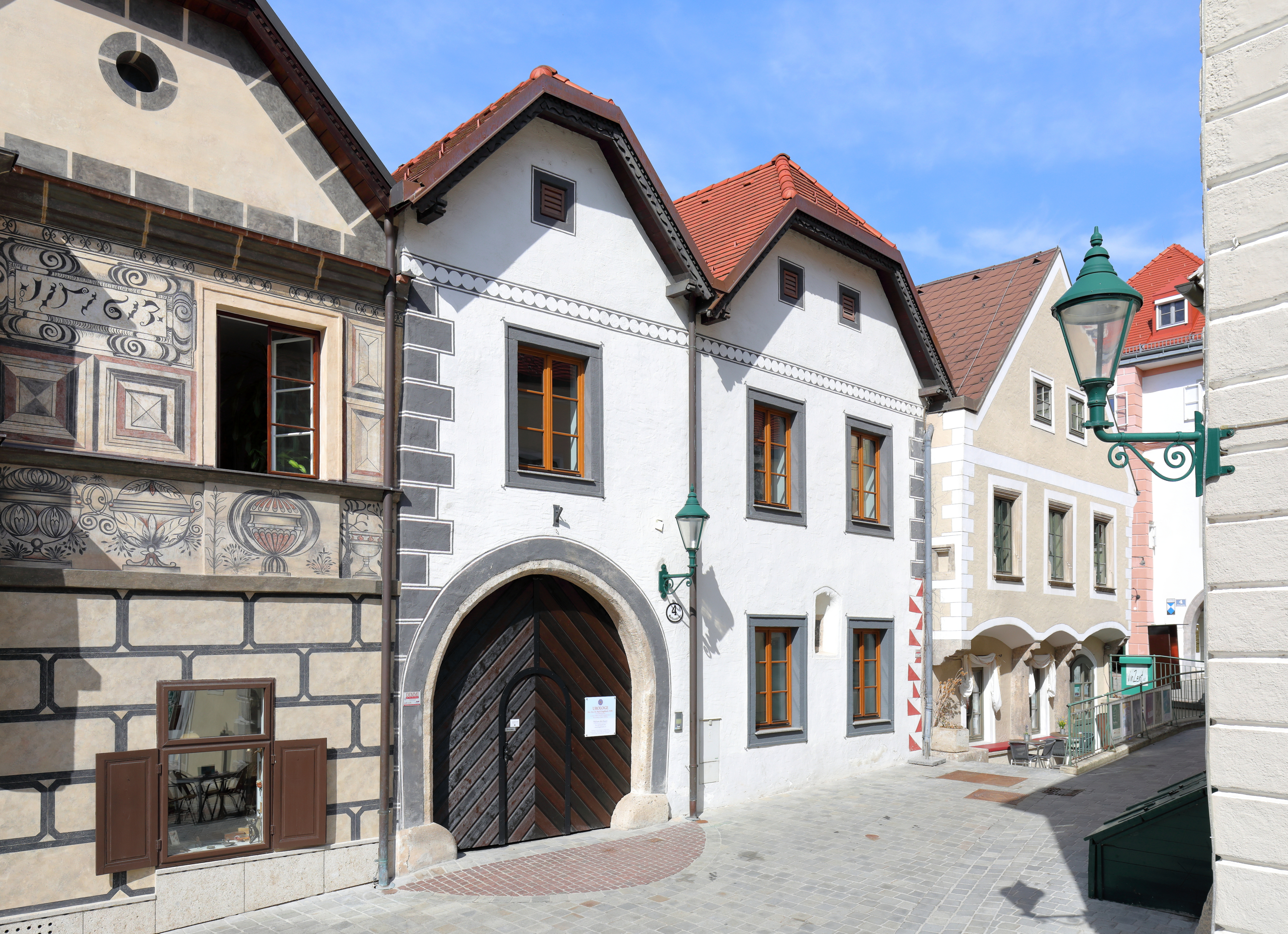 Bürgerhaus an der Adresse Rathausgasse 4 in der niederösterreichischen Bezirkshauptstadt Mödling.Der dreiachsige, zweigeschossige Bau mit 2 Schopfwalmgiebeln ist spätmittelalterlich/frühneuzeitlich und wurde im 17. Jahrhundert und in der 2. Hälfte des 19. Jahrhunderts prägend um- und ausgebaut. Auch das linke Haus (Rathausgasse 6) und rechte (Rathausgasse 2 / Pfarrgasse 3) sind in der Substanz spätmittelalterlich. Alle 3 Häuser werden urkundlich in der 1. Hälfte des 15. Jahrhunderts erwähnt.